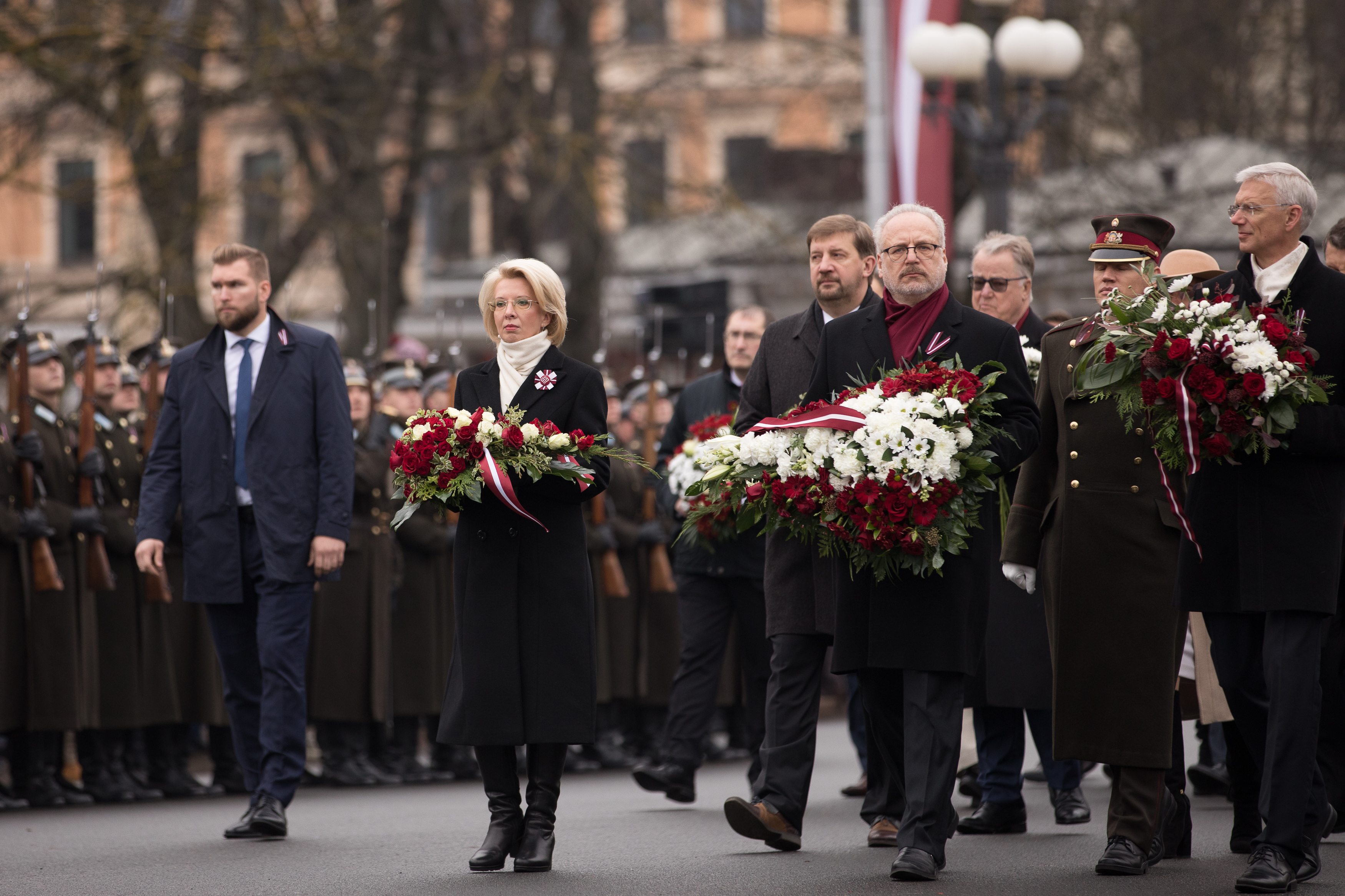 2019.gada 18.novembris. Latvijas Republikas proklamēšanas 101. gadadienai veltītā ziedu nolikšanas ceremonija pie Brīvības pieminekļa. Foto: Ernests Dinka, Saeima Izmantošanas noteikumi: saeima.lv/lv/autortiesibas